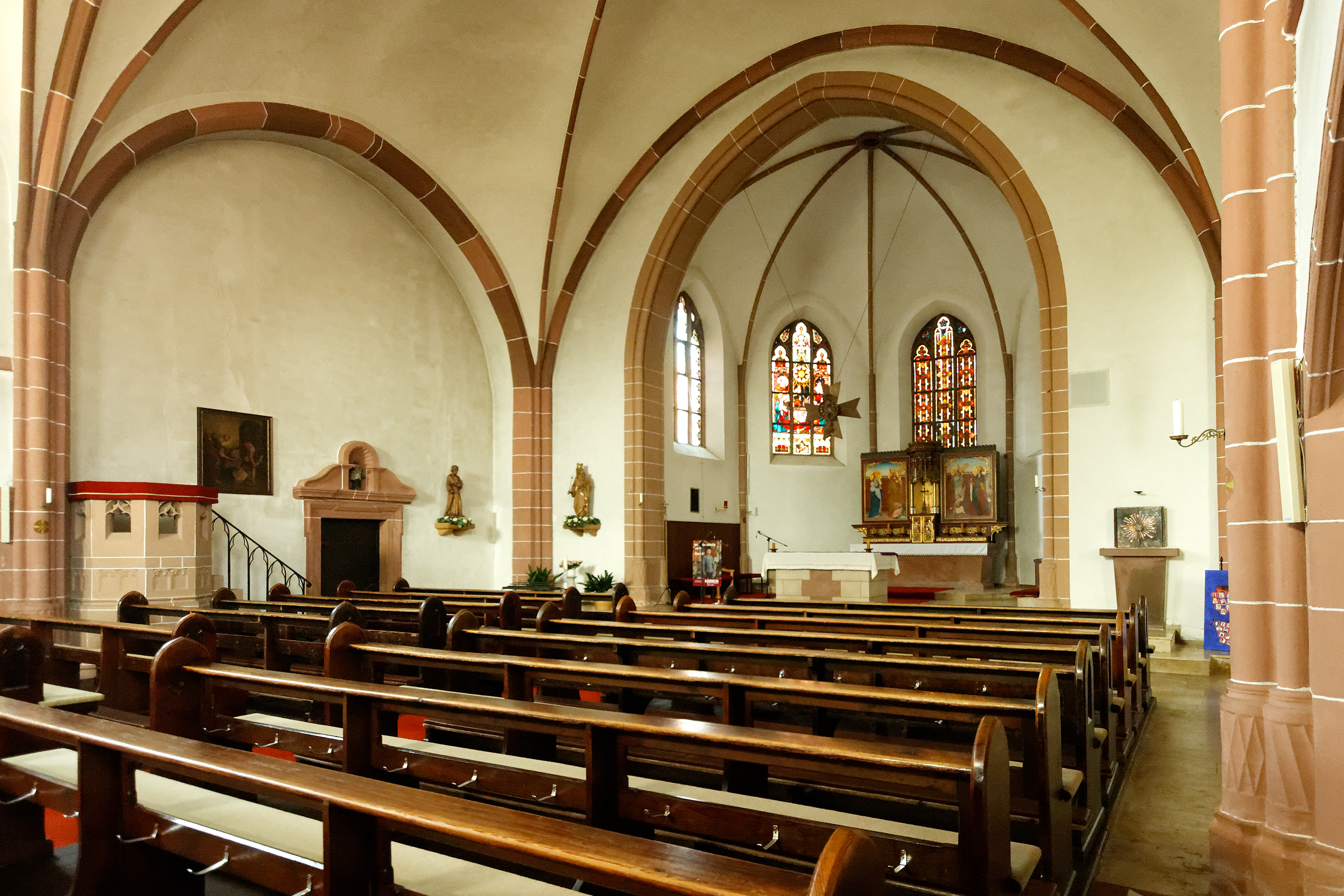 Kirche St. Johannes Baptist (Johanniterkirche) in Mosbach, einem Ortsteil der Gemeinde Schaafheim (Hessen).